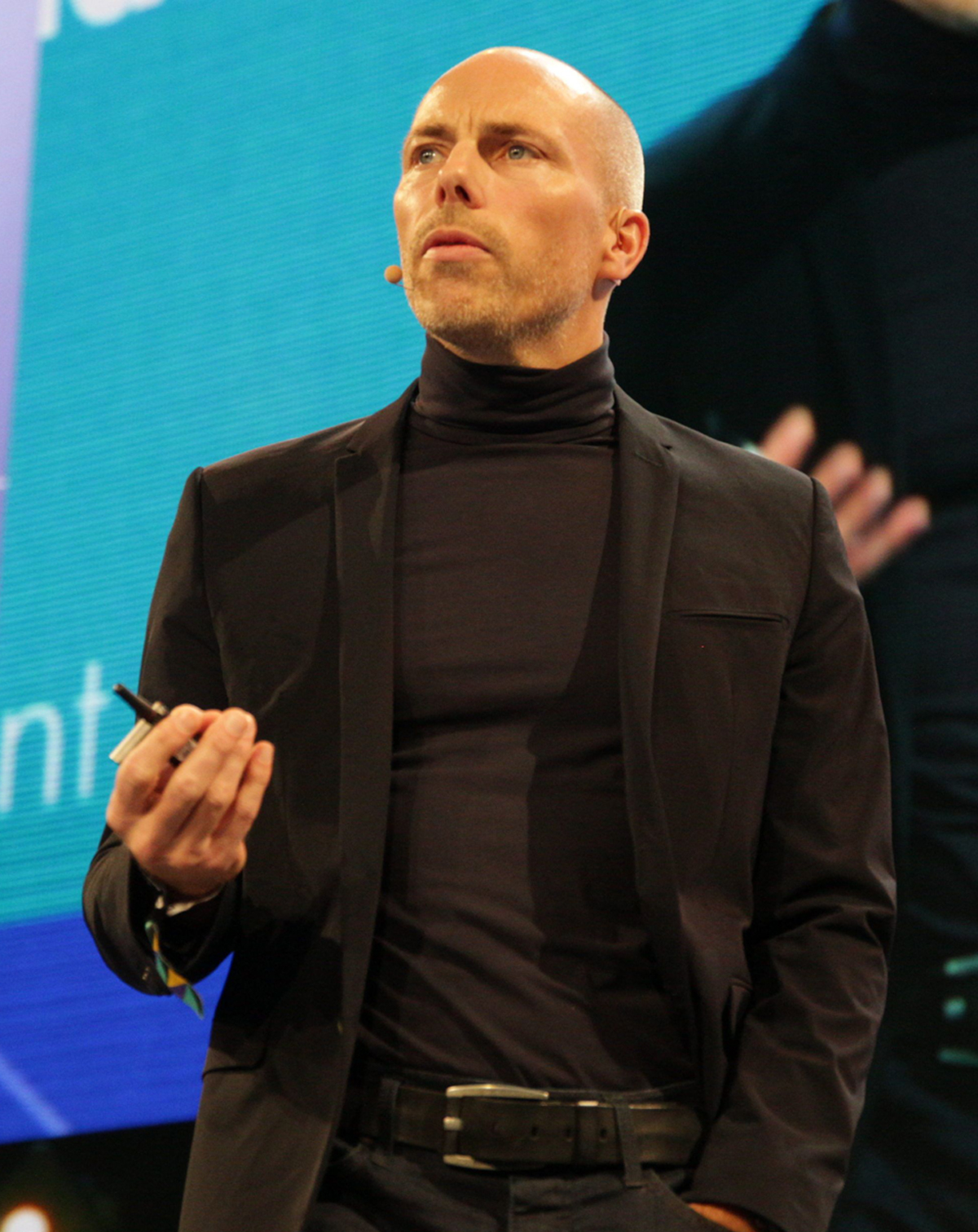 Jan Oetjen, Vorsitzender des Stiftungsrats der European netID Foundation und Geschäftsführer von GMX und web.de, spricht auf der Veranstaltung "Online Marketing Rockstars" am 22.03.2018 zum Thema netID: "Um mit der digitalen Identität nicht eine weitere Schlüsseltechnologie an die großen US-amerikanischen Wettbewerber zu verlieren, haben wir die netID als einen offenen branchenübergreifenden Standard entwickelt, der die technischen Standards für die übergreifende ID des Nutzers regelt und über eine neutrale Stiftung gesteuert werden wird".